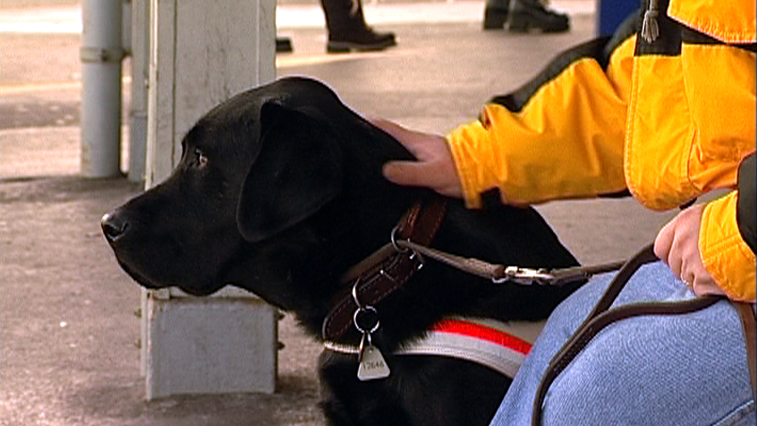 Image tirée de « Collection Premier Jour » de Fernand Melgar.